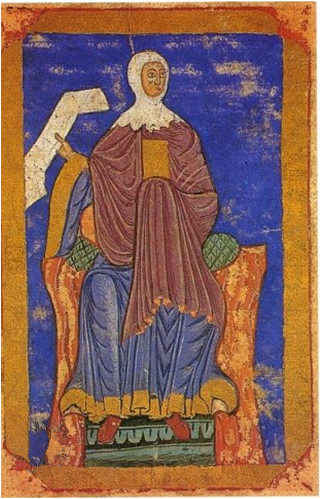 Urraca, señora de Zamora, no Tombo A da catedral de Santiago de Compostela.